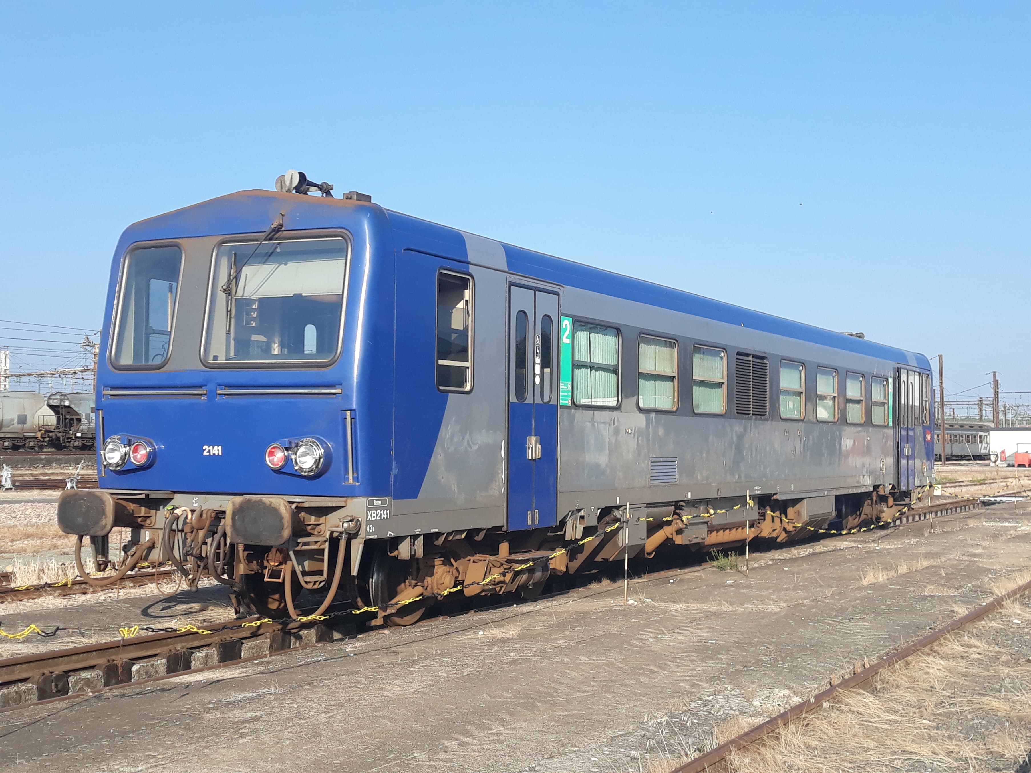 L'autorail X 2141, préservé par l'association CFTST - Autorails de Touraine, dans les premiers mois de sa restauration dans le dépôt SNCF de Vierzon (18).